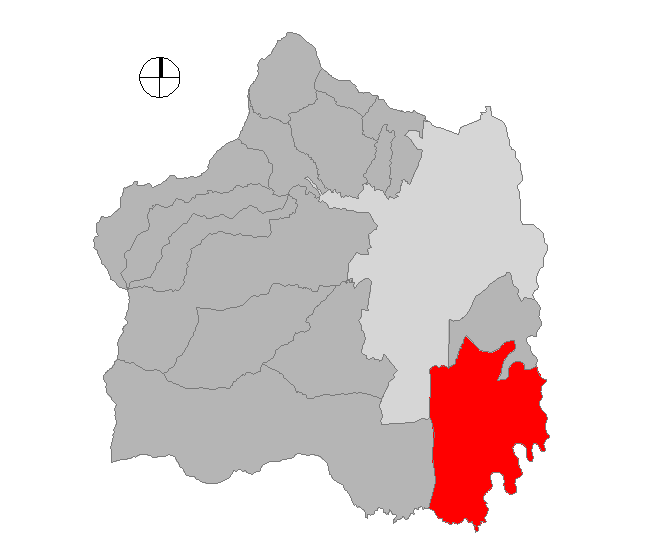 Corregimiento de Cali, Colombia